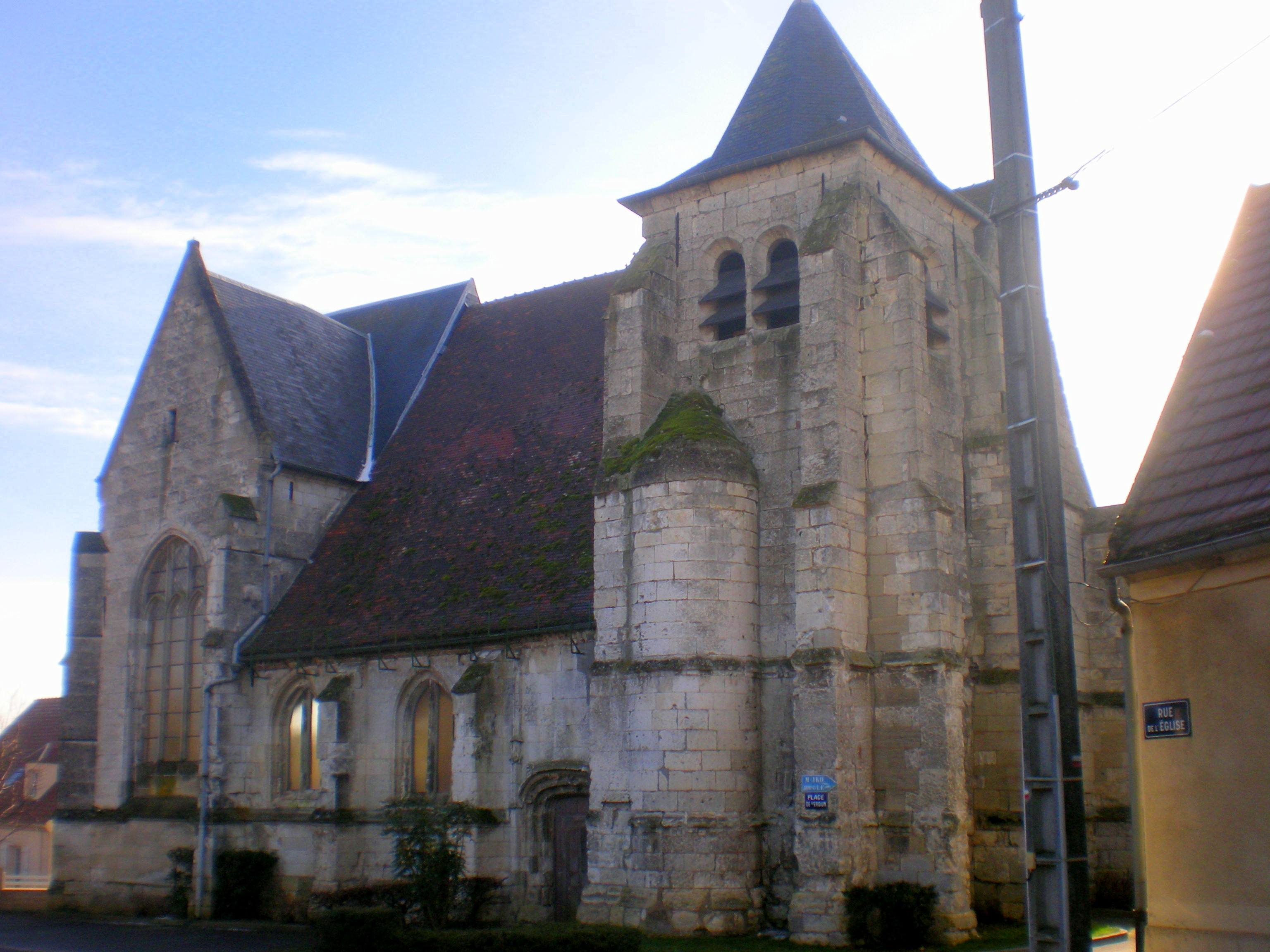 Vue générale de l'église Saint-Martin de Maimbeville (Oise).